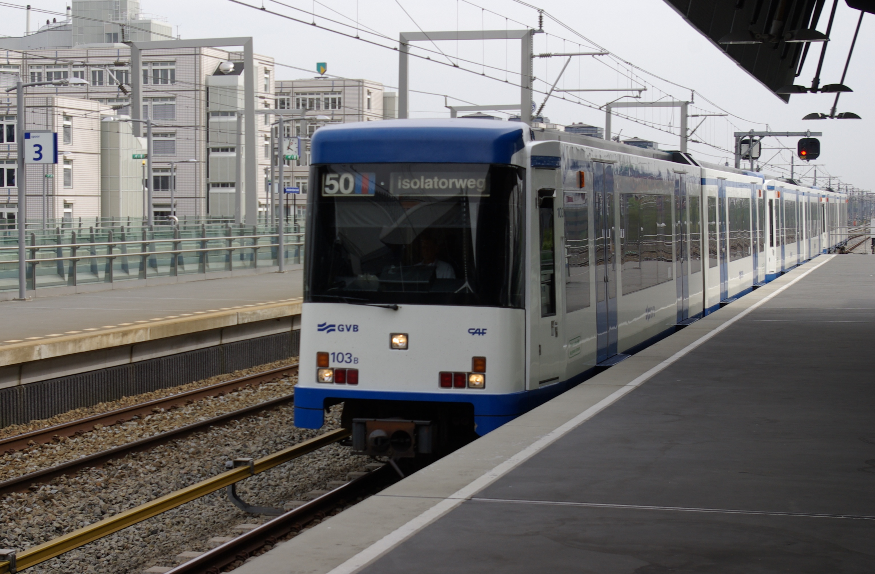 Station Amsterdam Bijlmer ArenA, Metro Amsterdam, treinstel CAF M4